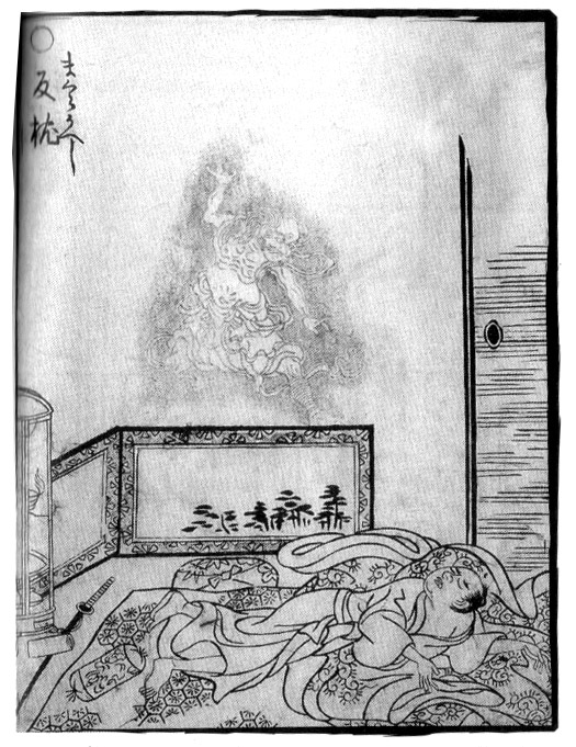 Makura-gaeshi(反枕) from the Gazu Hyakki Yakō